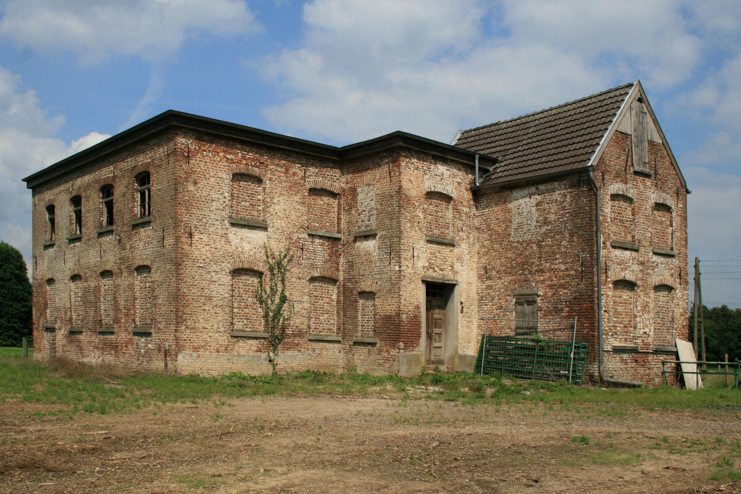 Rittergut Baerlo, Burganlage Haus Baerlo, Bauzeit: Ende des 18. Jh., Adresse: Baerlo 12 in Nettetal (OT Breyell), Eintrag in die Denkmalliste: 20.1.1989 This is a photograph of an architectural monument.